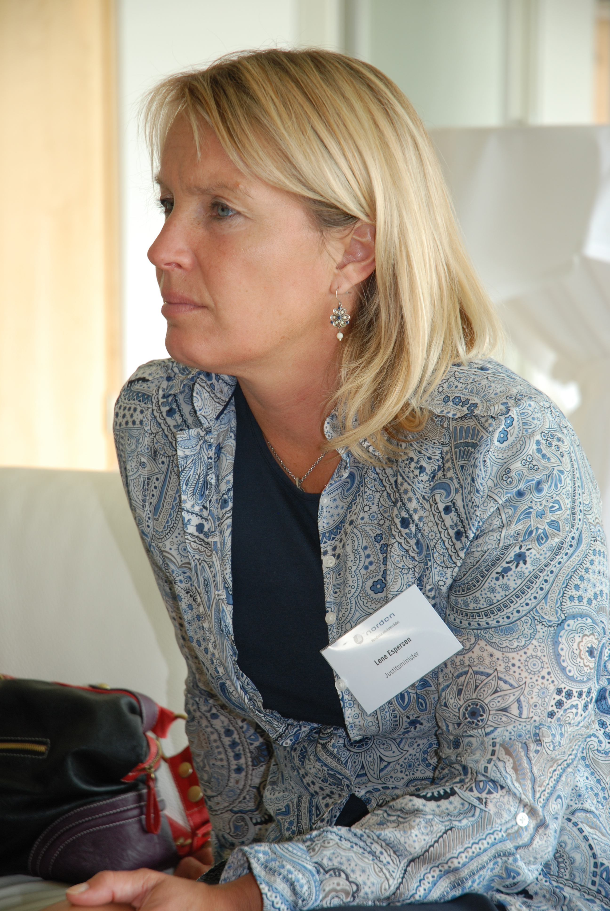 Danmarks justitieminister Lene Espersen